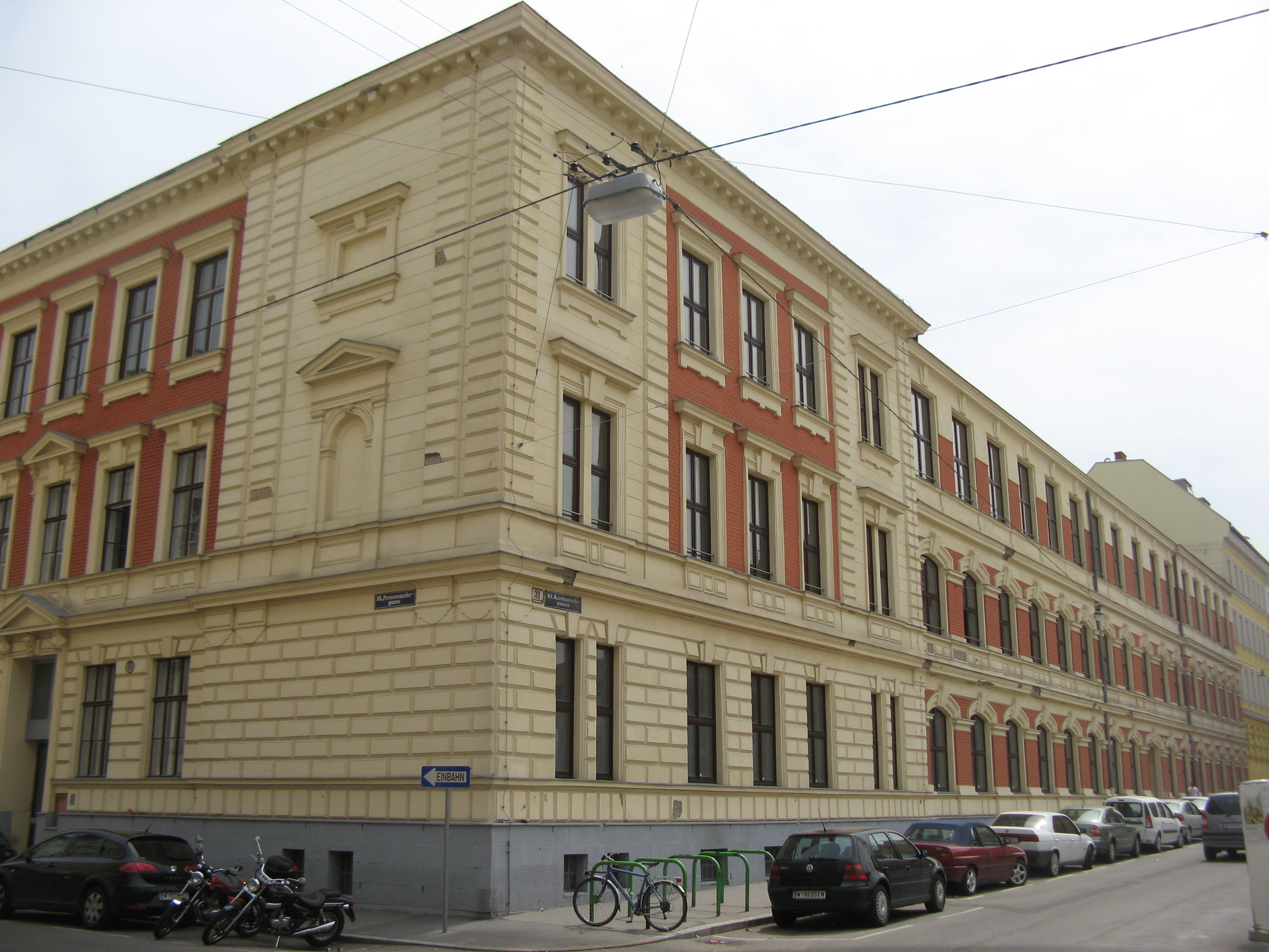 Handelsakademie (1888), Pernerstorfergasse 79-81, Wien-Favoriten